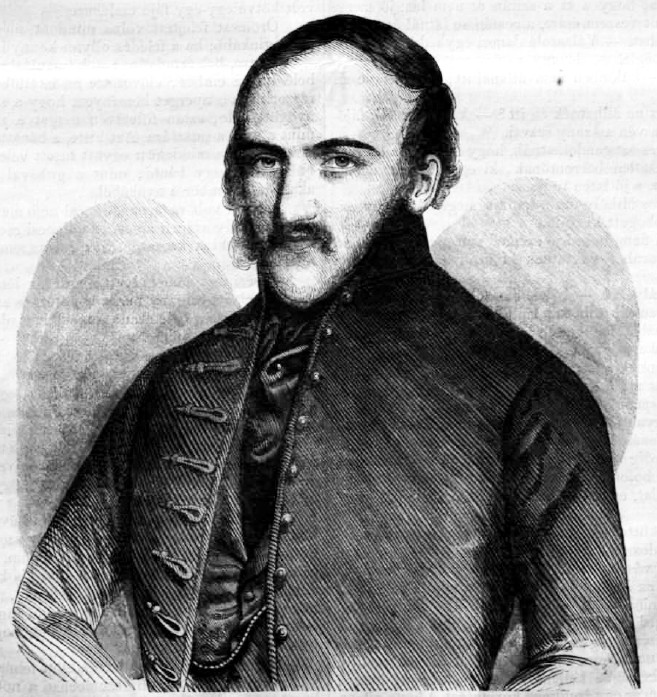 Fényes Elek (1807–1876) statisztikai és földrajzi író, a Magyar Tudományos Akadémia tagja